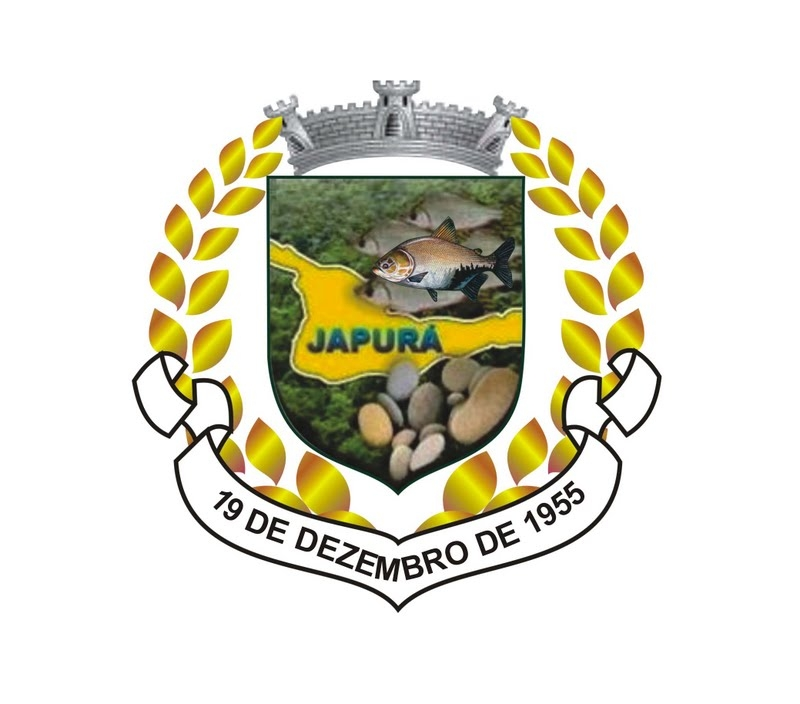 Brasão de Armas do município de Japurá, Amazonas, Brasil.